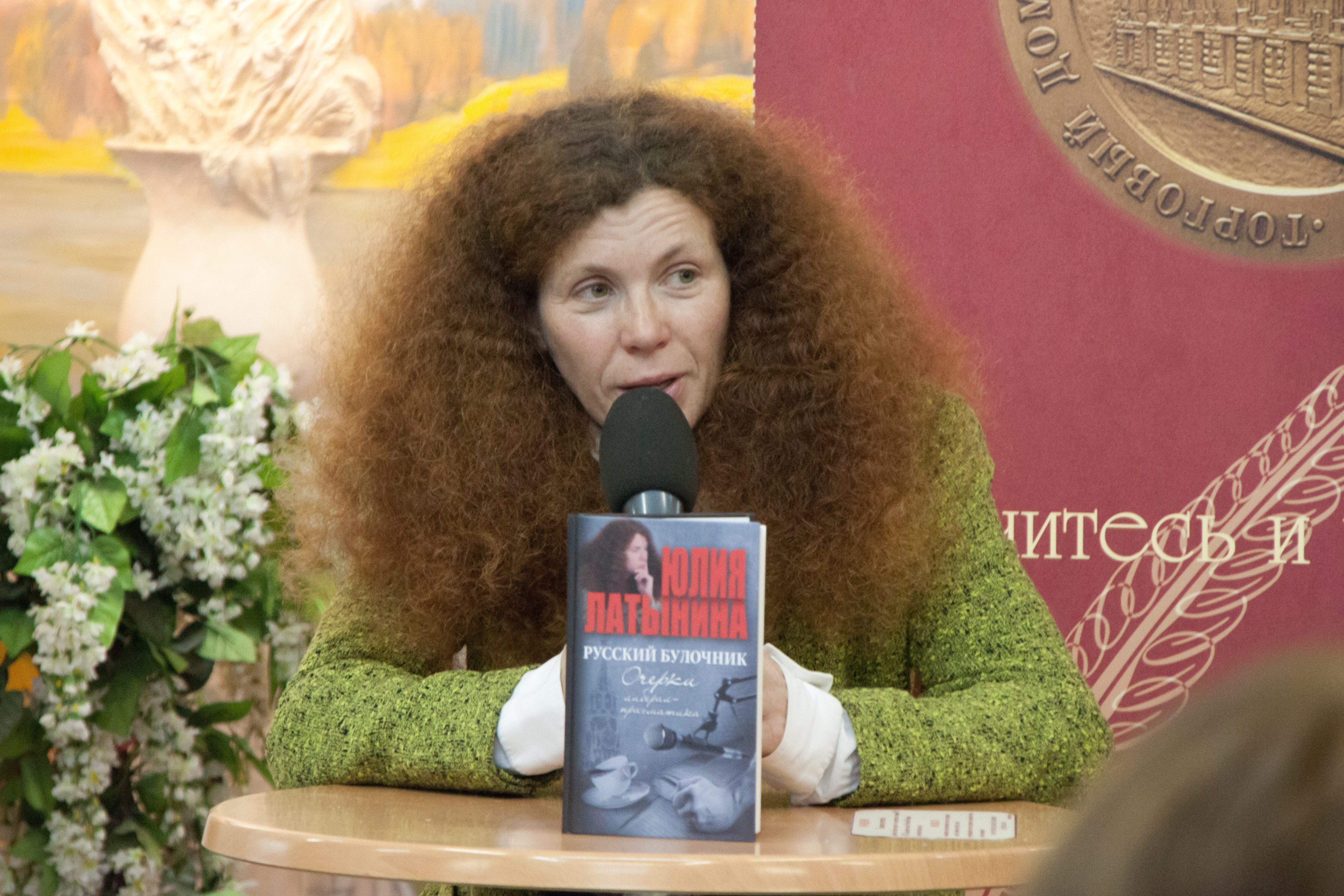 Юлия Латынина